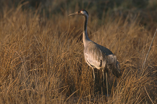 Grus grus